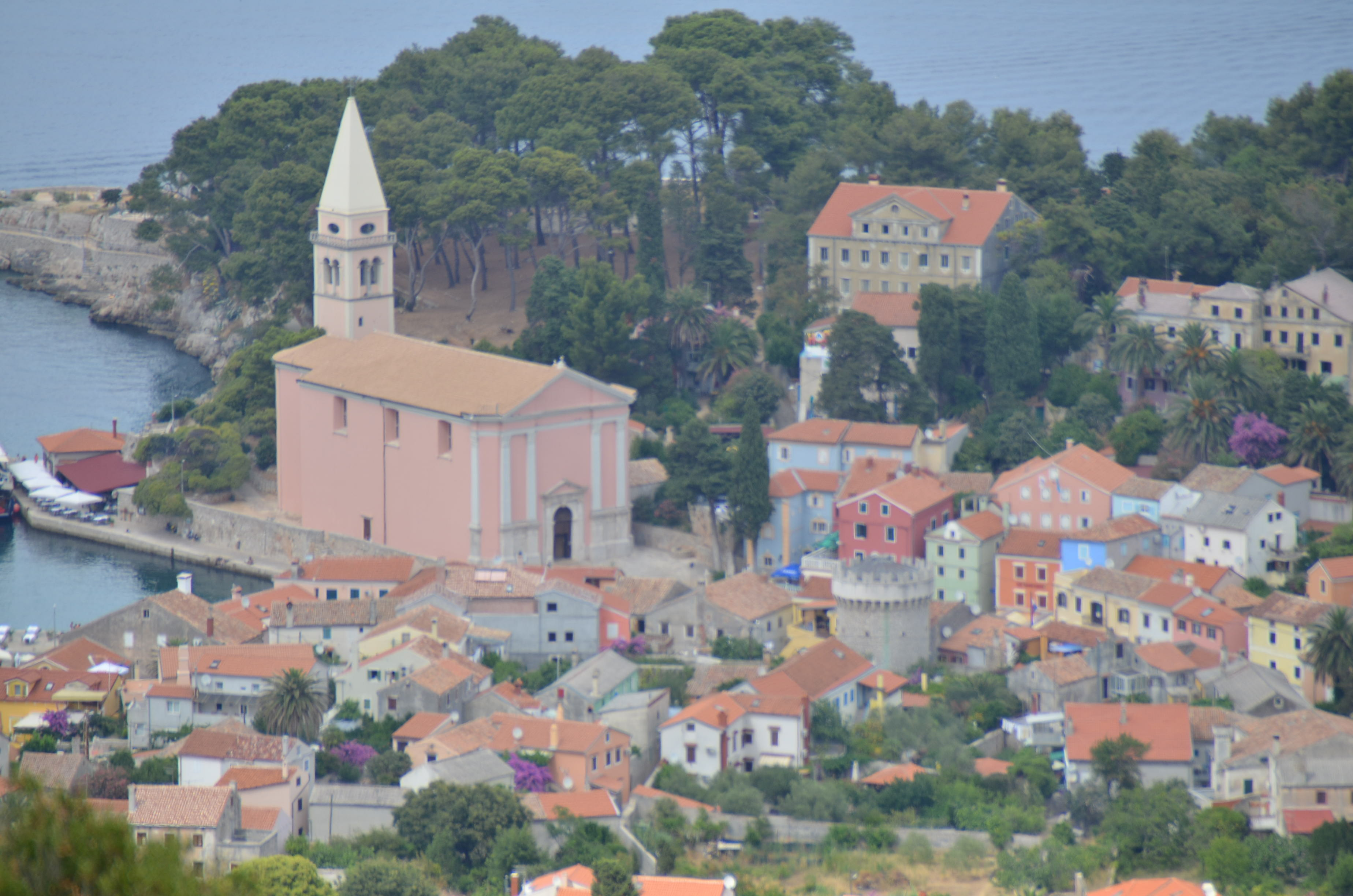 Veli Lošinj, Croatia